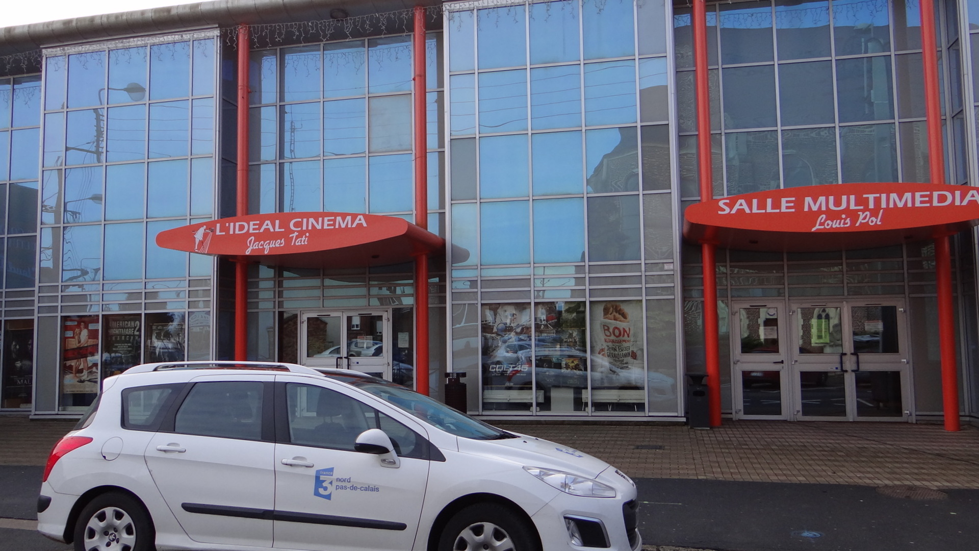 L'idéal cinéma Jacques Tati Direct du 4/11/2014 FR3 Nord Picardie